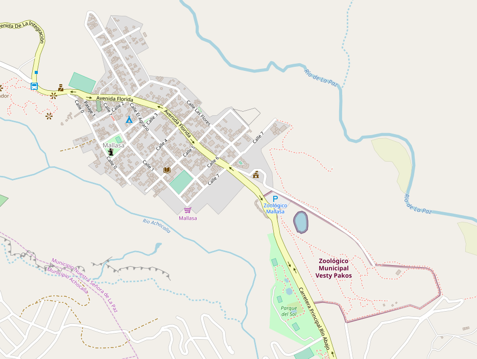 Mapa de la zona de Mallasa en OpenStreetmap 2019